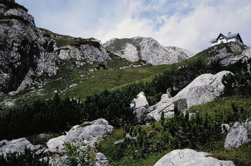 Admonter Haus in den Haller Mauern (Ennstaler Alpen)